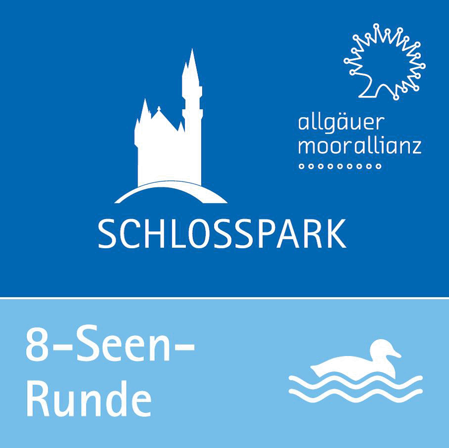 Logo 8-Seen-Runde